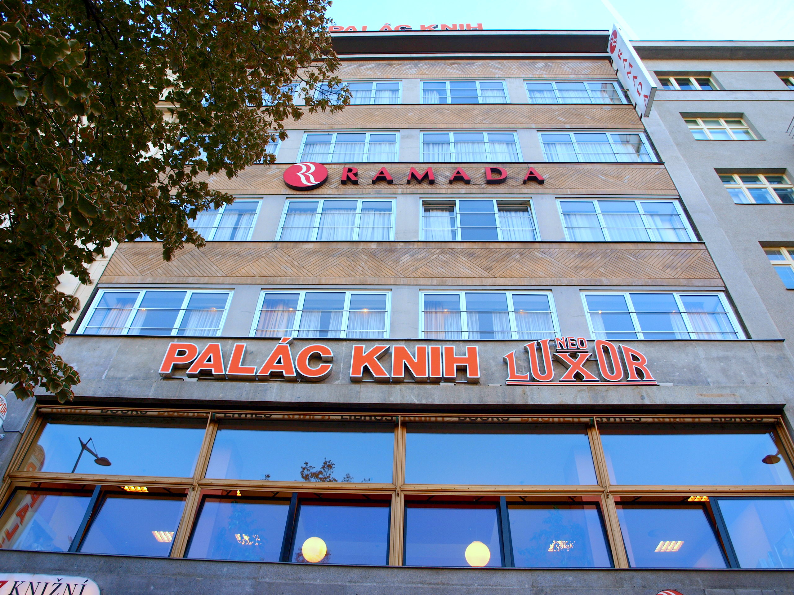 Palác Luxor